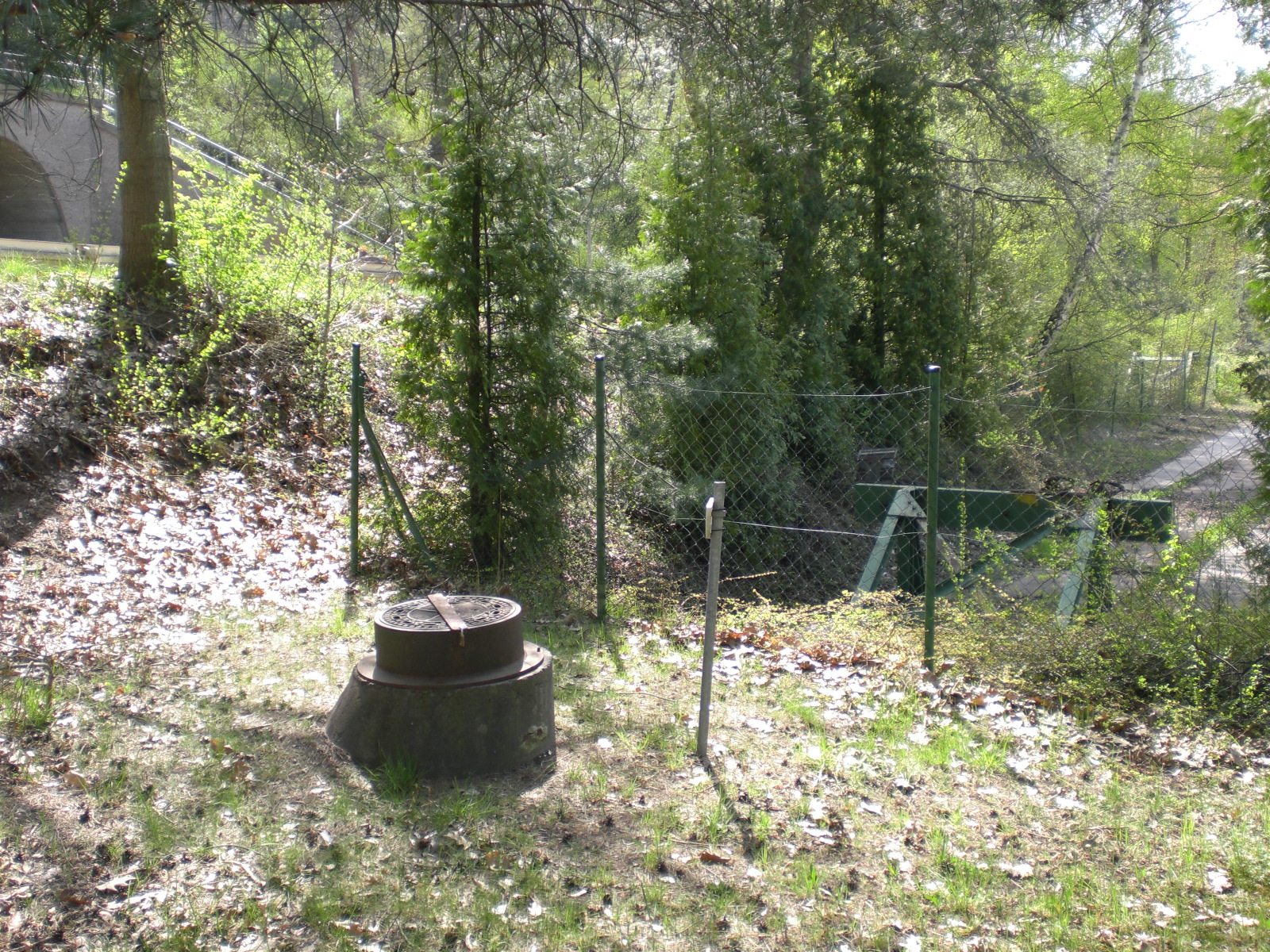 Einstieg Hasseler Tunnel